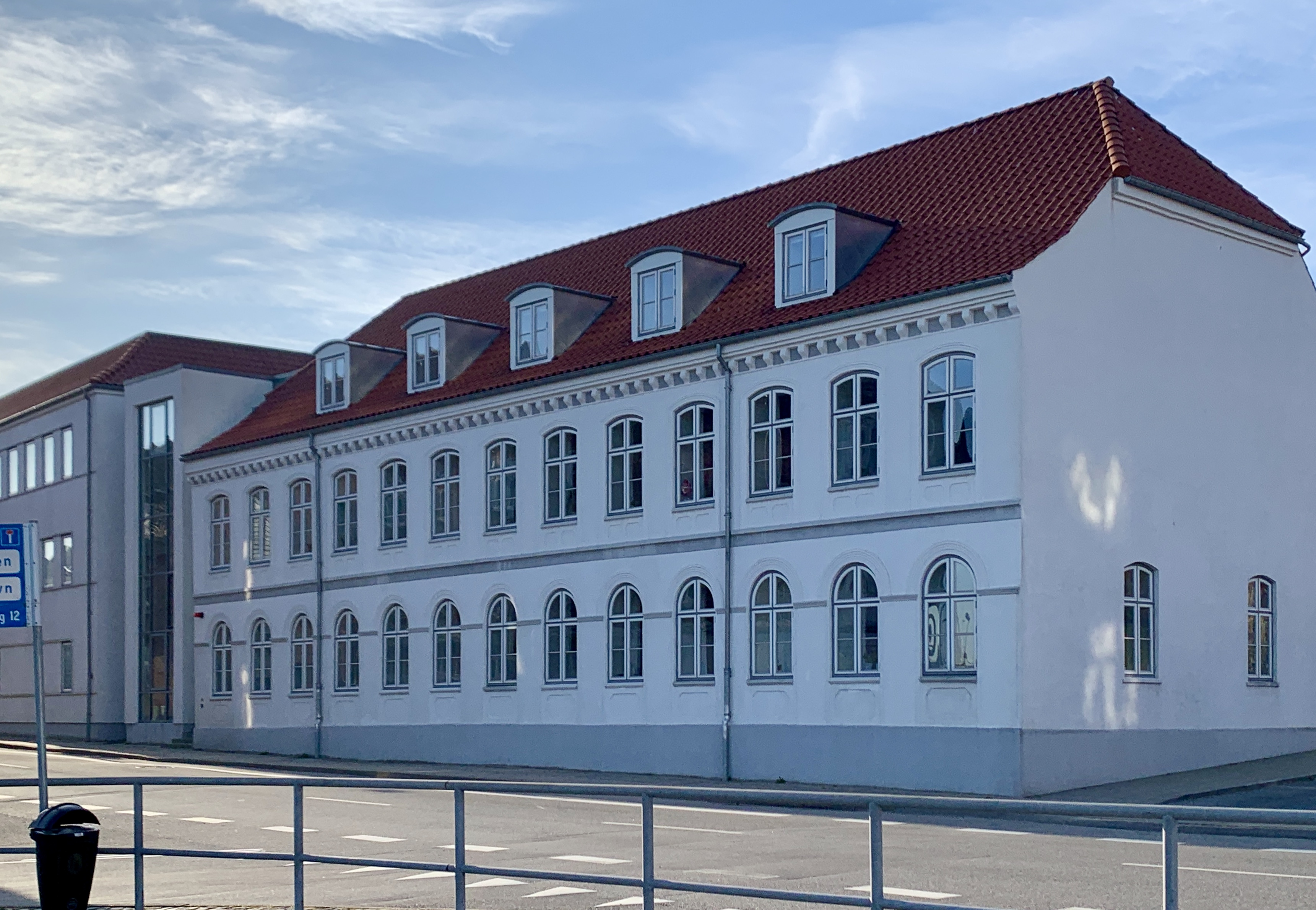 Hadsunds ældste bygning fra 1855.